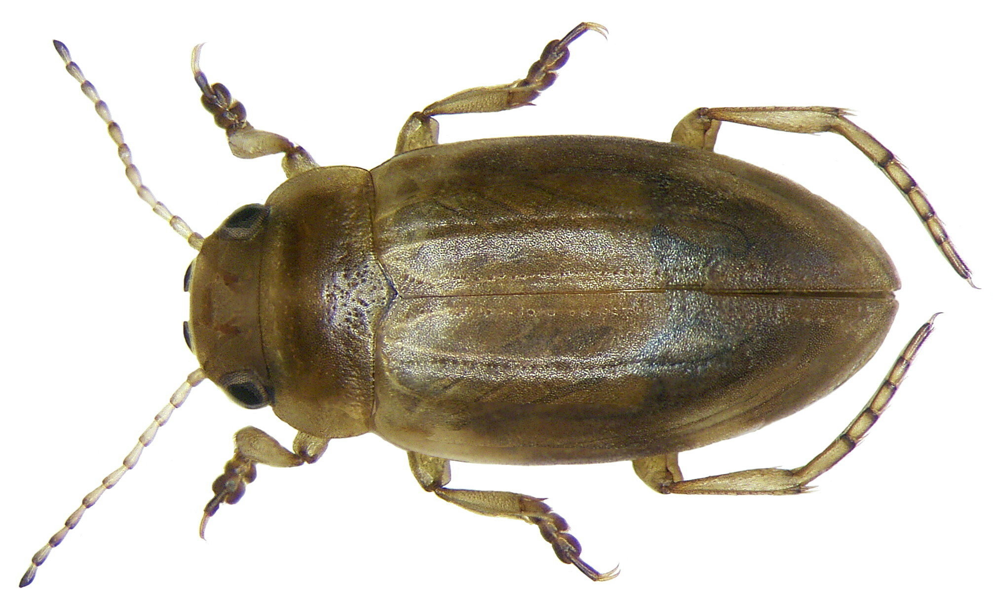 Nebrioporus martinii (Fairmaire, 1862) Familie: Dytiscidae Grösse: 4,8 mm Fundort: Korsika, Corte leg. Schuh, 2002; det. Shaverdo Type Coll. Museum Dresden Foto: U.Schmidt, 2007